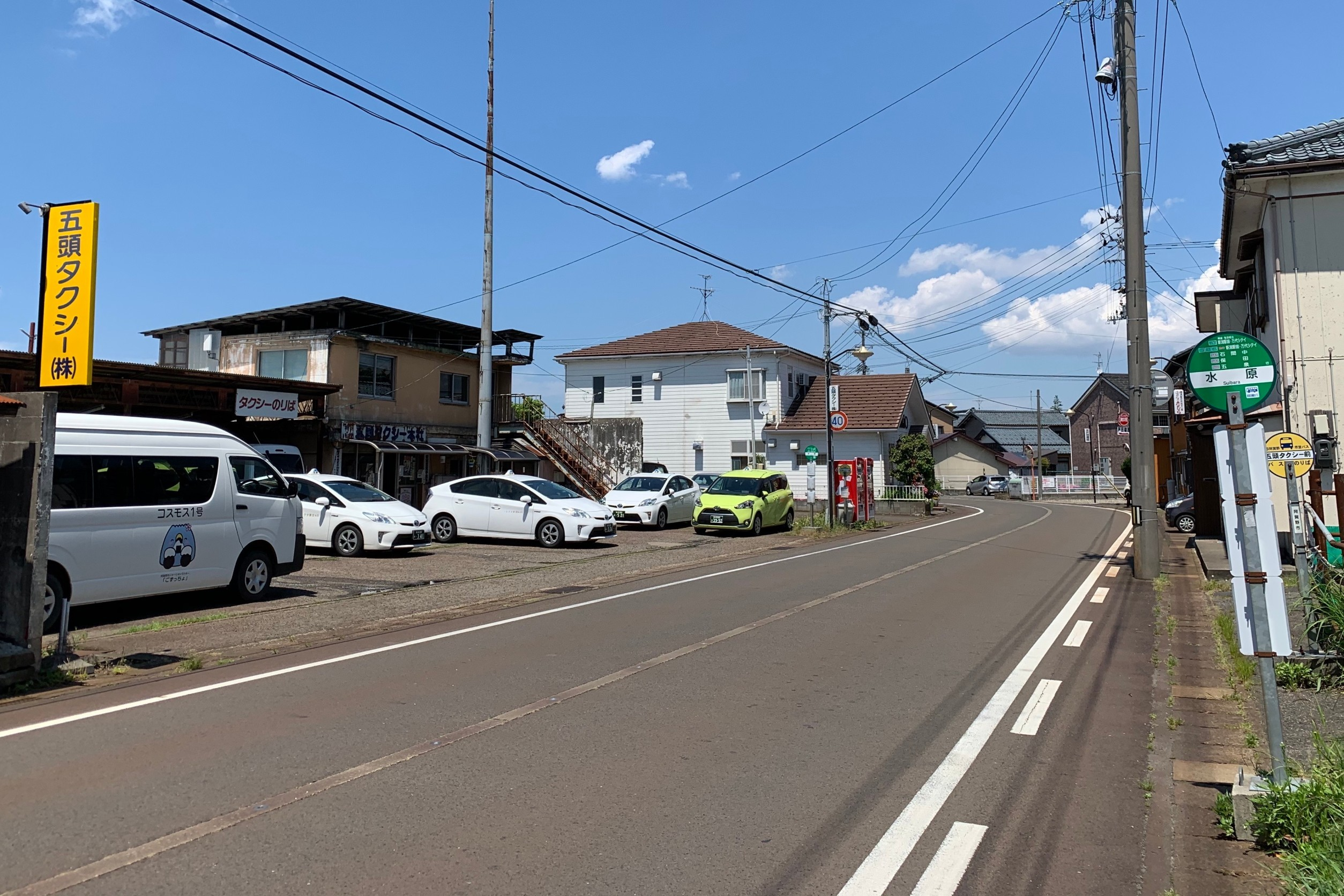 新潟交通観光バス「水原」バス停と阿賀野市営バス「五頭タクシー前」バス停（2020年5月）羽越本線水原駅東口から徒歩約3分、県道303号沿いにある。